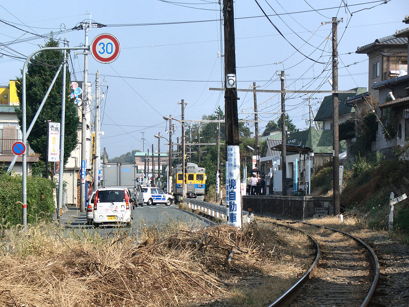 熊本電気鉄道八景水谷駅 奥が御代志駅方面、手前が北熊本駅方面。 撮影者/著者/著作権保有者 : MK Products (本人がアップロード) 撮影日 : 2006/09/24 八景水谷駅用にアップロードした画像です。良い画像があれば別の画像に変えてください。